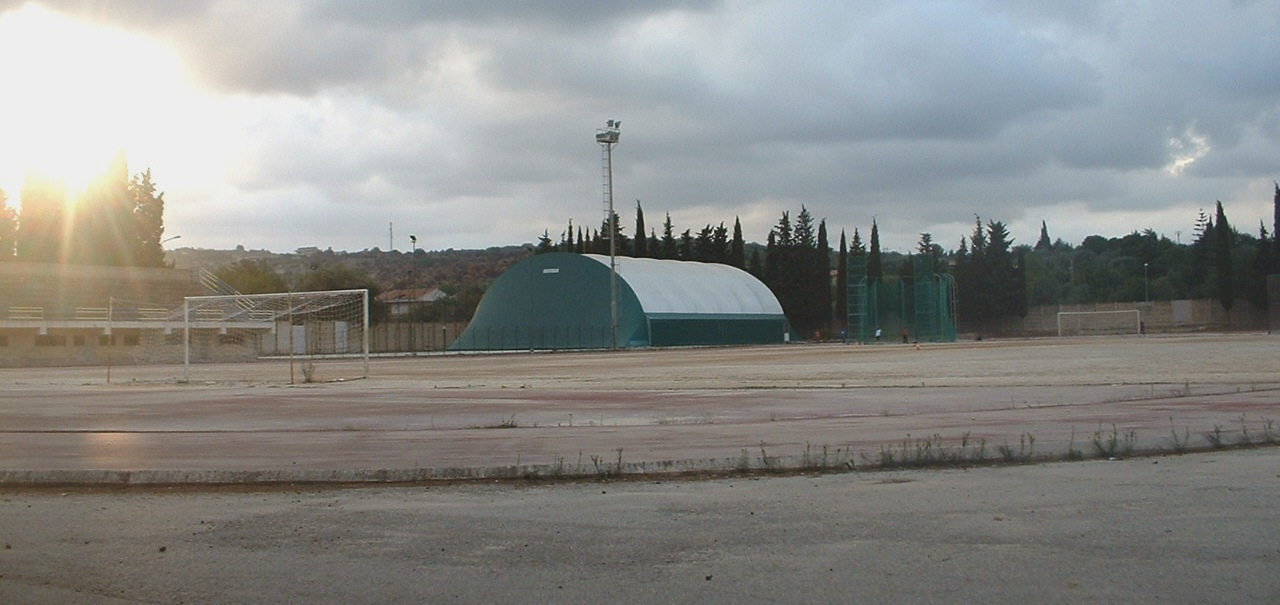 Solarino, "Pippo Scatà" Stadium